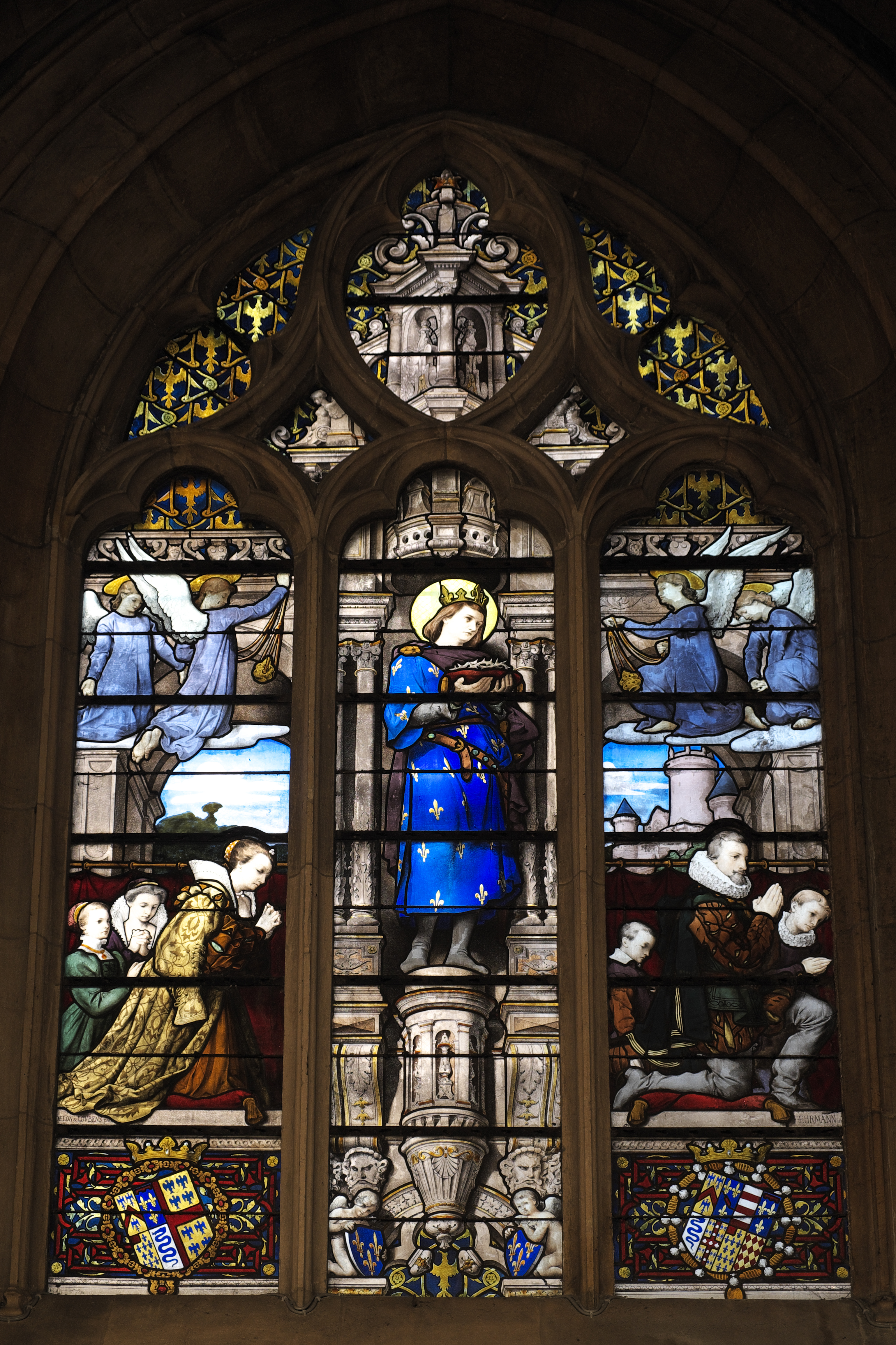 Katholische Pfarrkirche Saint-Martin (Collégiale Saint-Martin) in Montmorency, Bleiglasfenster Nr. 17 (19. Jahrhundert) mit der Signatur DELON & LOUBENS (links) und der Signatur F. EHRMANN (rechts), Darstellung: Ludwig der Heilige (Mitte) mit der Dornenkrone, Jeanne de Montmorency mit zwei Töchtern (links) und Louis III de La Trémoille mit zwei Söhnen (rechts), Karton: Charles Leprévost, Ausführung: François Emile Ehrmann (siehe: Dominique Foussard, Charles Huet, Mathieu Lours: Églises du Val-d'Oise. Pays de France, Vallée de Montmorency. Société d'Histoire et d'Archéologie de Gonesse et du Pays de France, 2. Auflage, Gonesse 2011, ISBN 9782953155426)